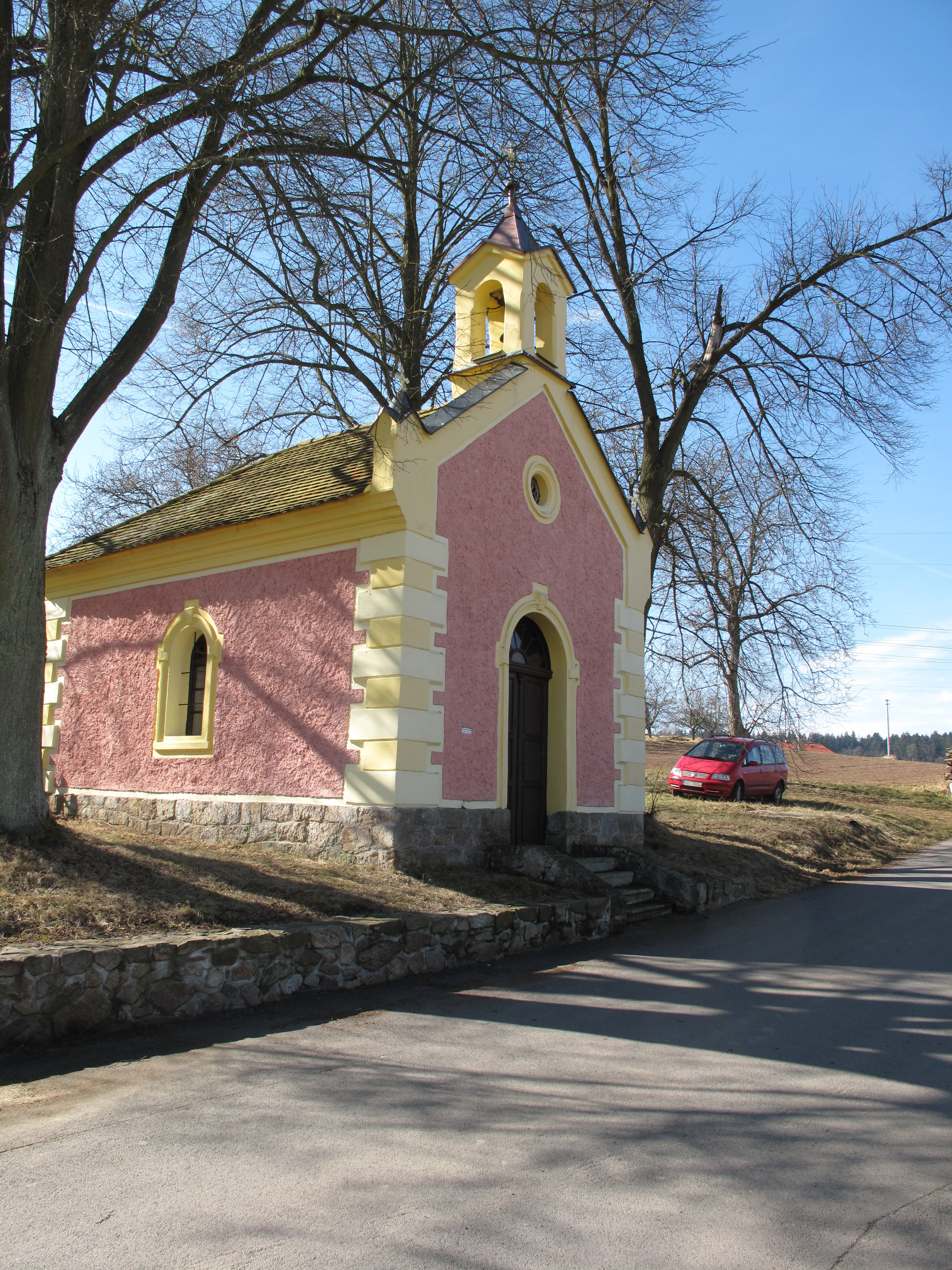 Kaplička v Hradišti. Okres Prachatice, Česká republika.